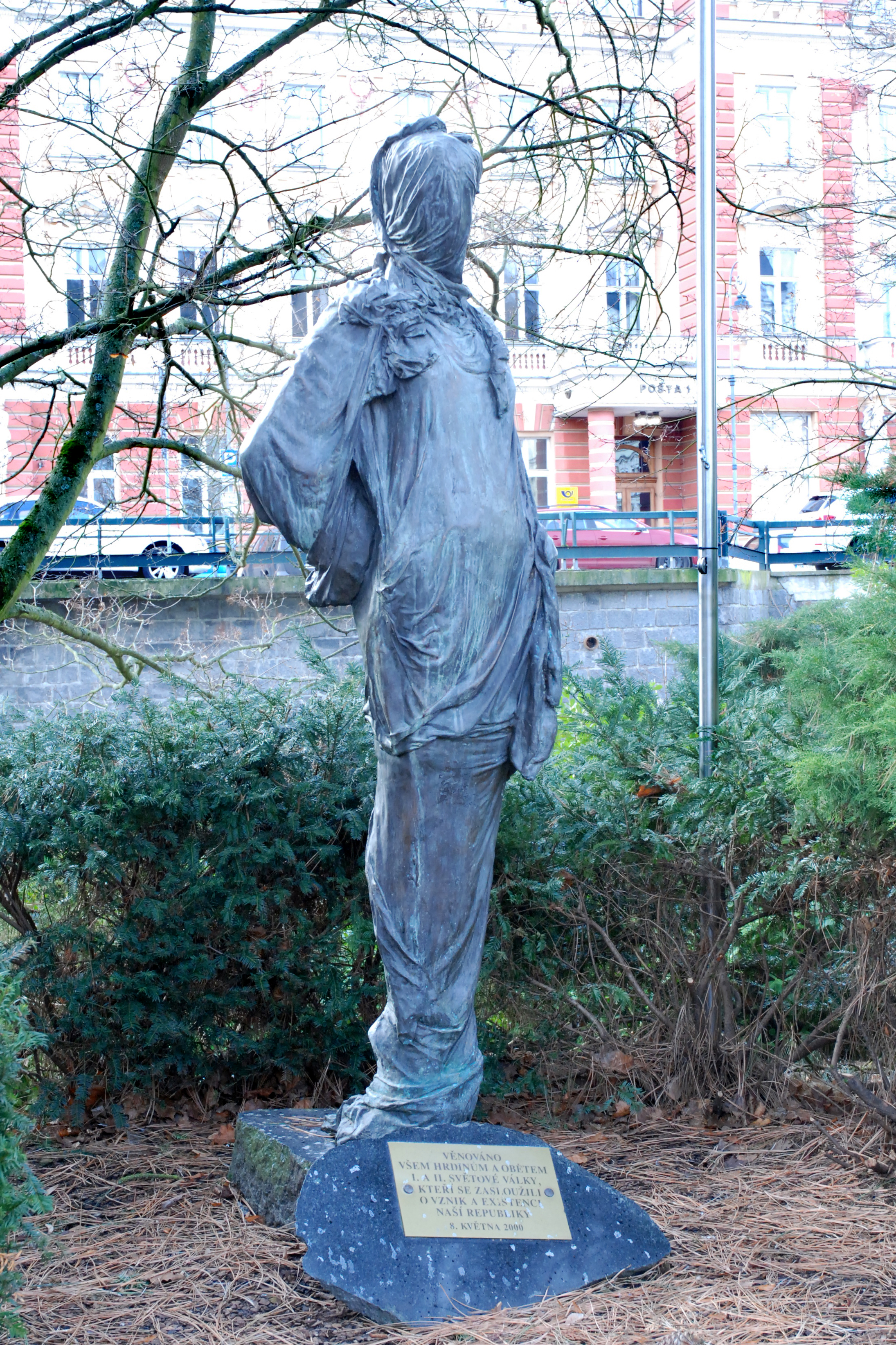 Pomník obětem 1. a 2. světové války – zvaný Pieta – v Karlových Varech